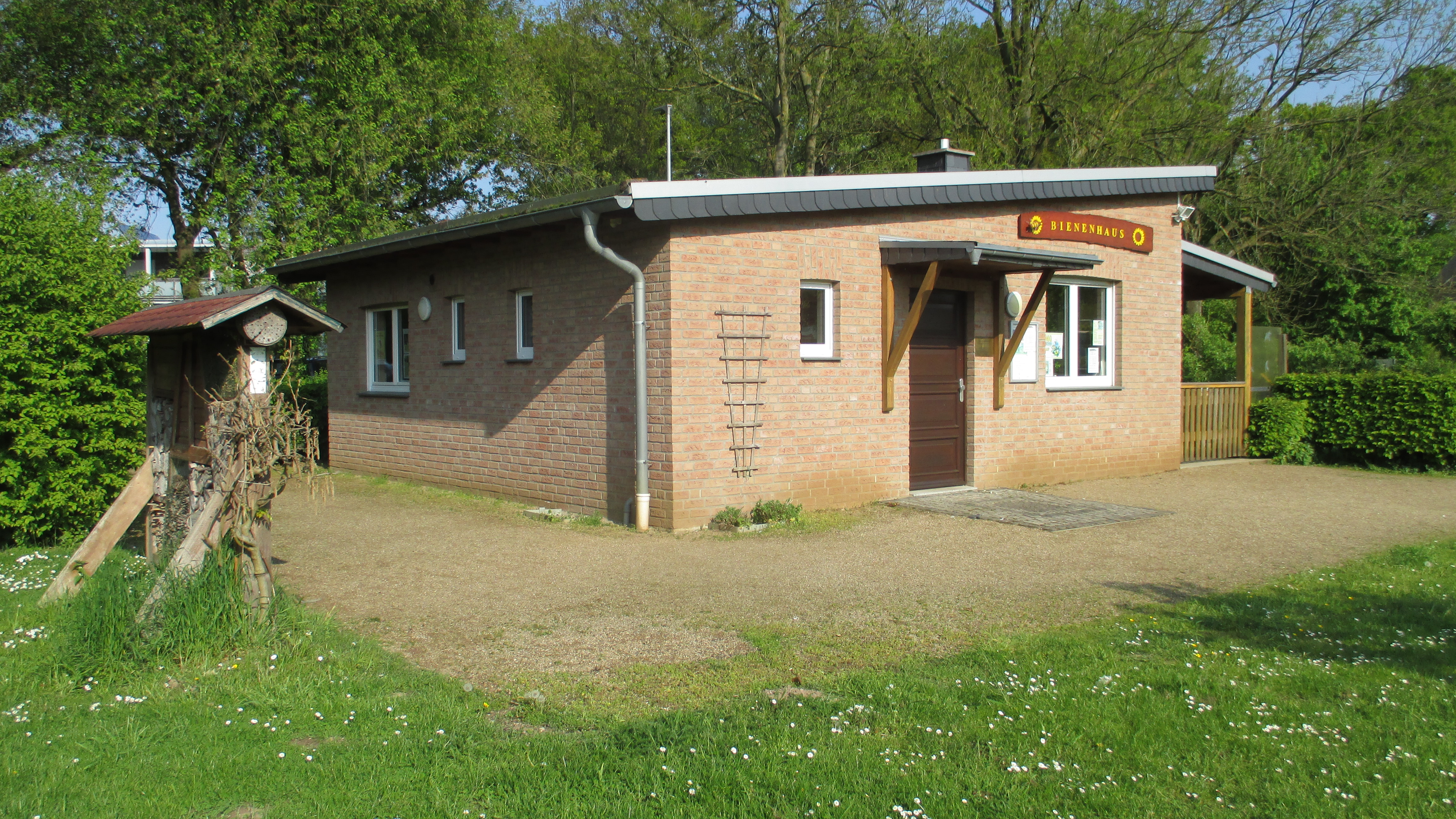 Das Bienenhaus am Alten Garten vom Bienenzuchtverein Vierquatieren.